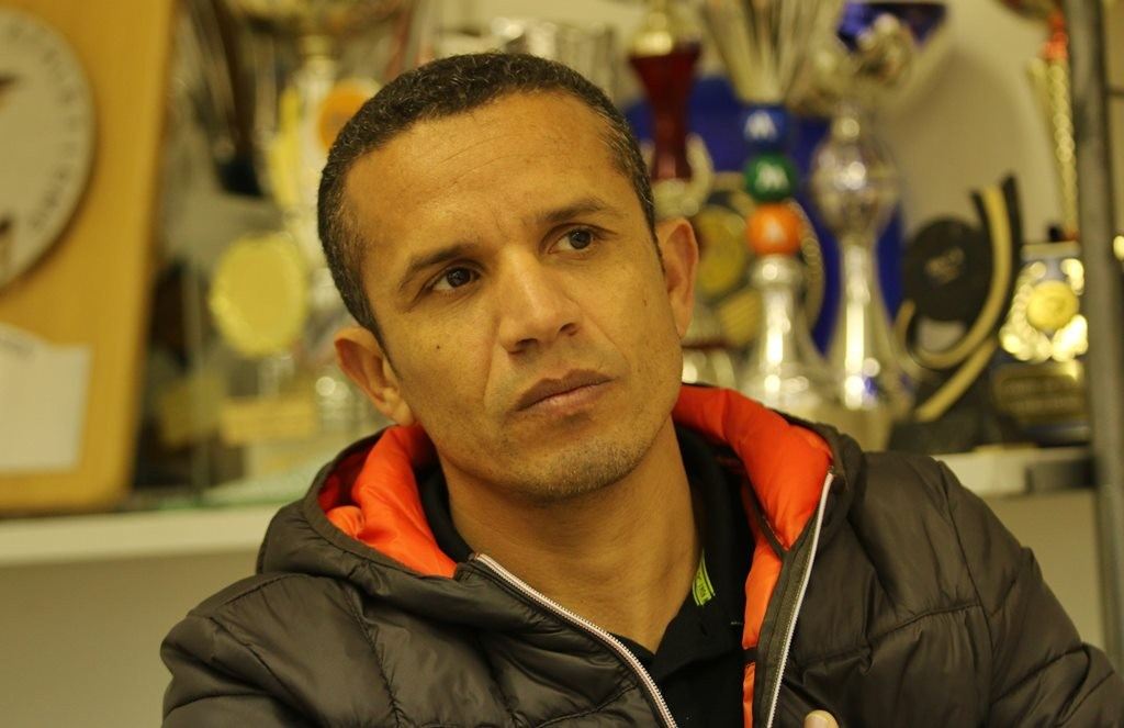 reunion du club